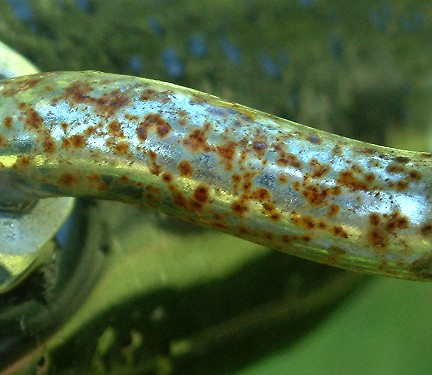 Flugrost -- vor dem Reinigen / rust film -- before cleaning